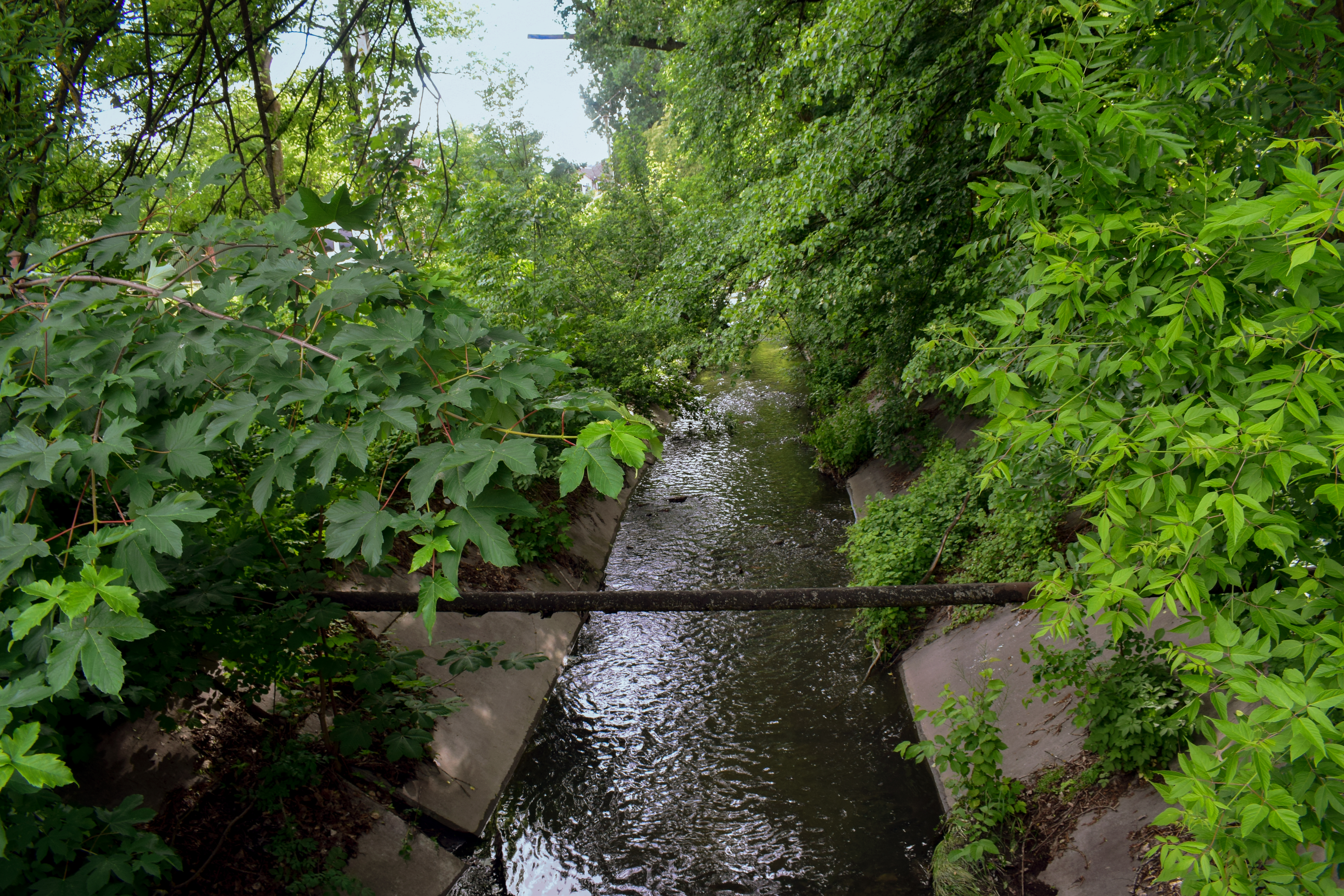 Парк ім. генерала Васильєва, м. Дрогобич Річечка - притока Тисмениці